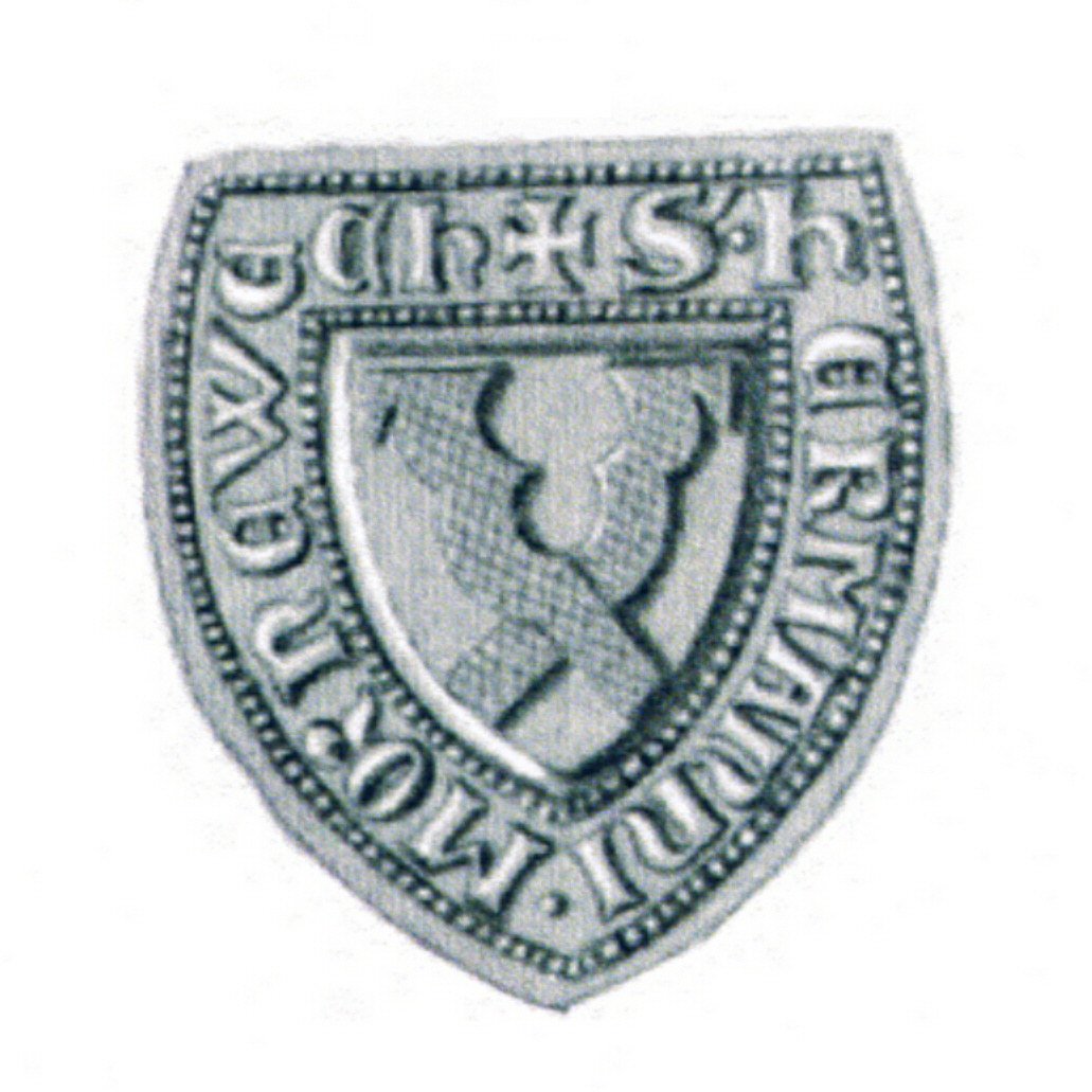 Siegel des Hermann Morneweg, vereinzelt auch Mornewech geschrieben, (* um 1270 wahrscheinlich in King’s Lynn (England); † 25. Januar 1338 in Lübeck) war Bürgermeister der Hansestadt Lübeck. Das Siegel stammt aus der Zeit um 1328. Siehe Emil Ferdinand Fehling: Lübeckische Ratslinie, Nr. 299 (Hermann Morneweg).